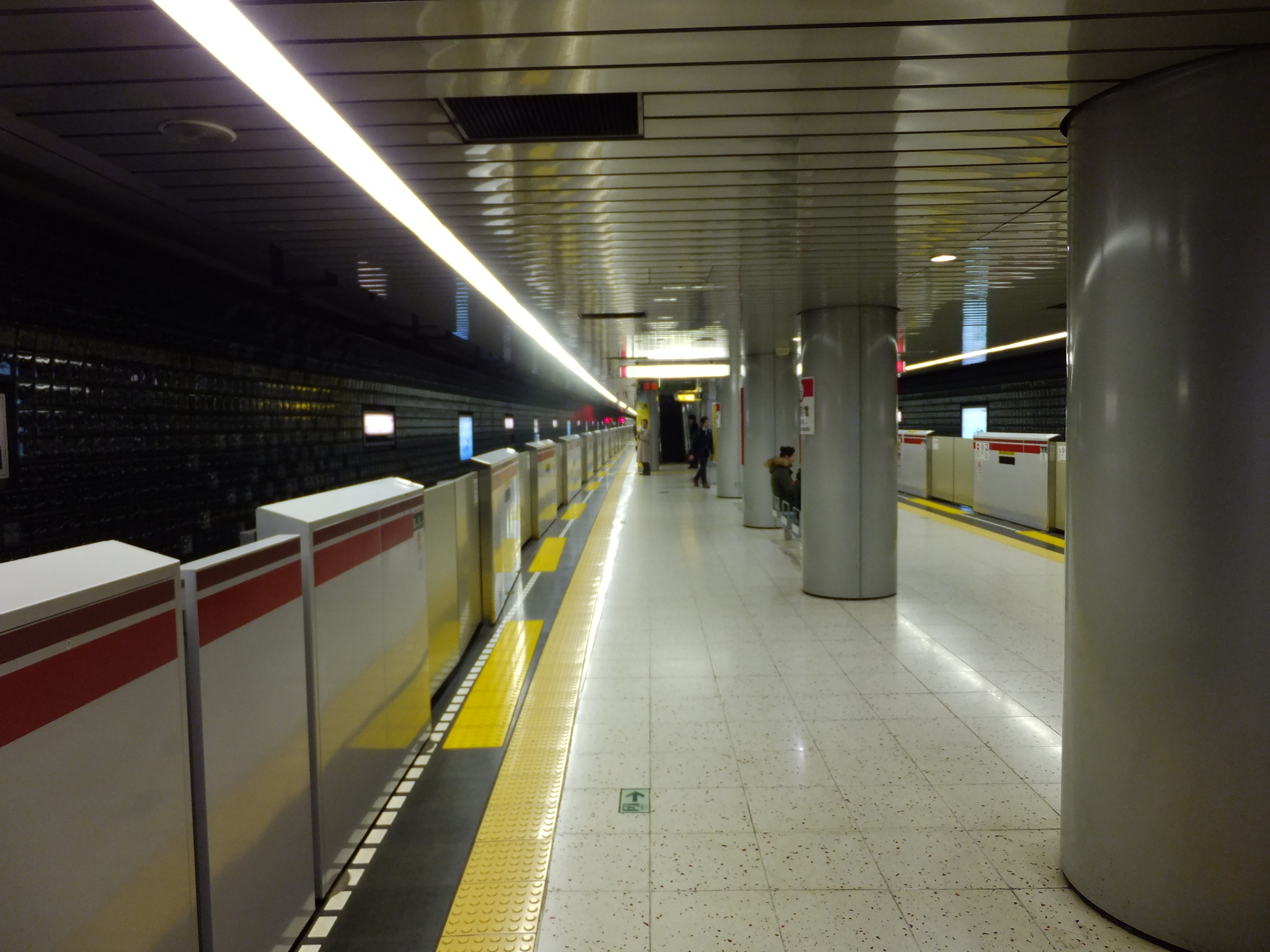 都営地下鉄大江戸線・赤羽橋駅プラットホーム